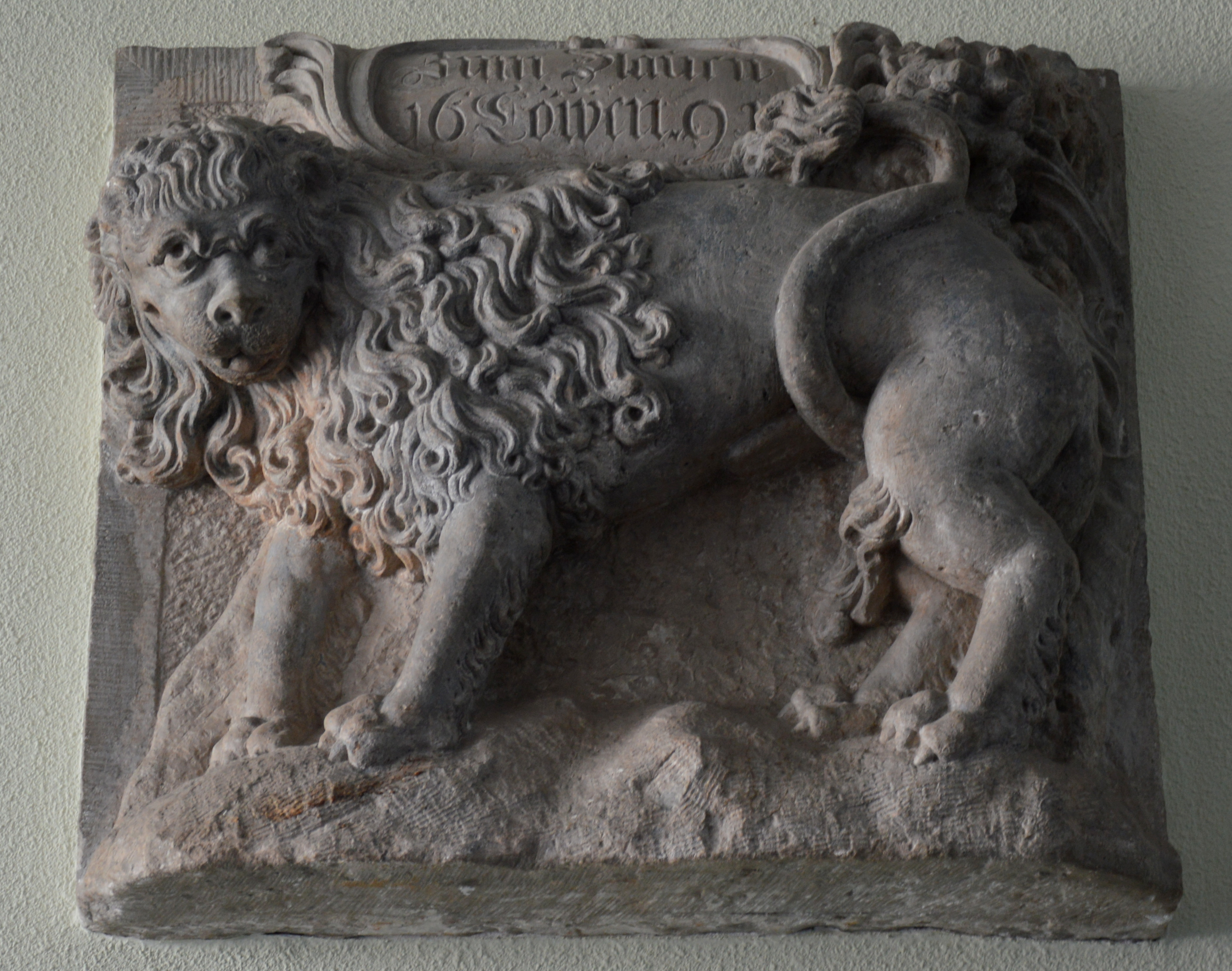 Alter Markt 12, 13 Hauszeichen Magdeburg